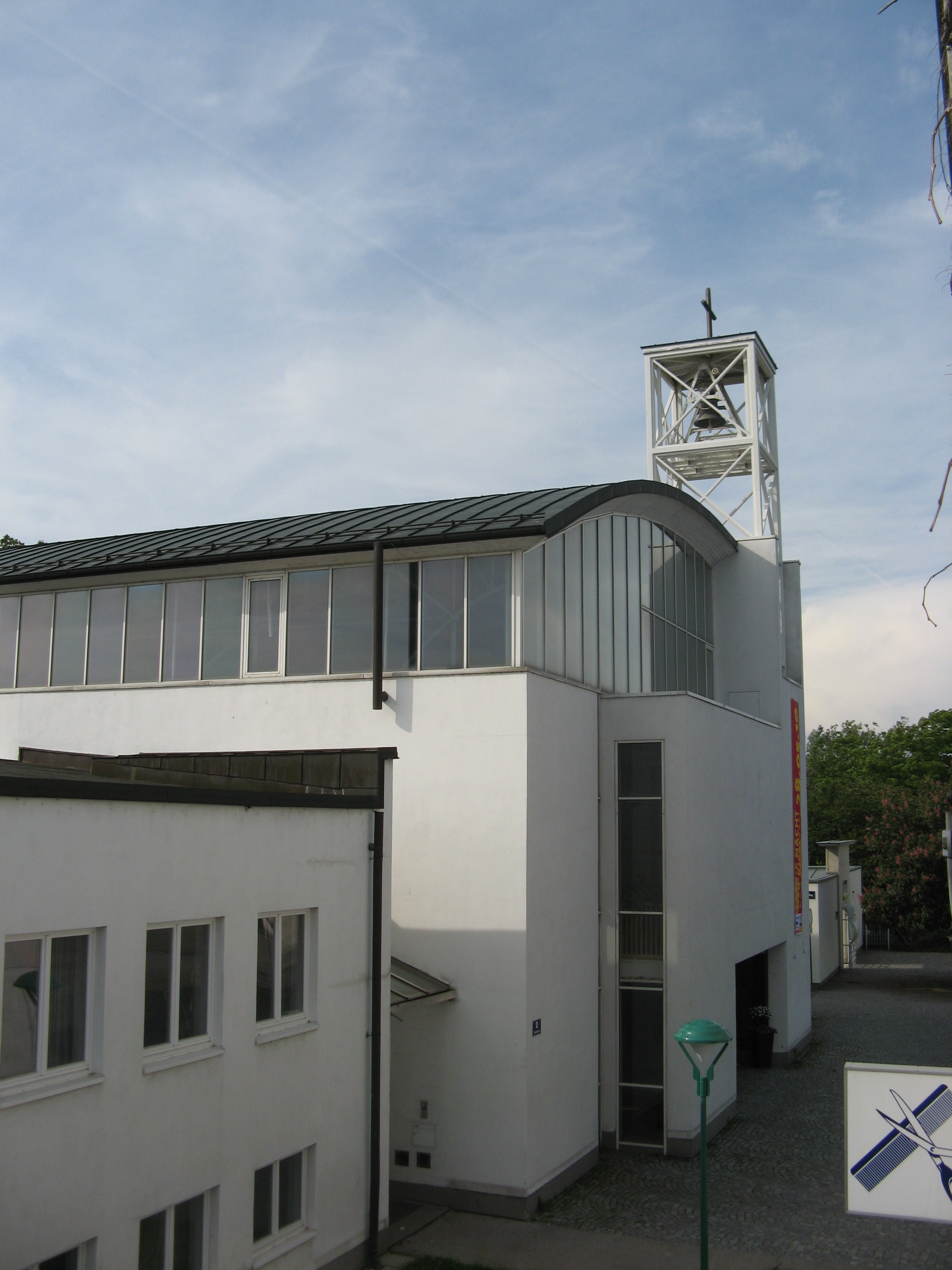 Emmaus am Wienerberg (1990-1992) von Otto Häuselmayer, Tesarekplatz 2, Wien-Favoriten